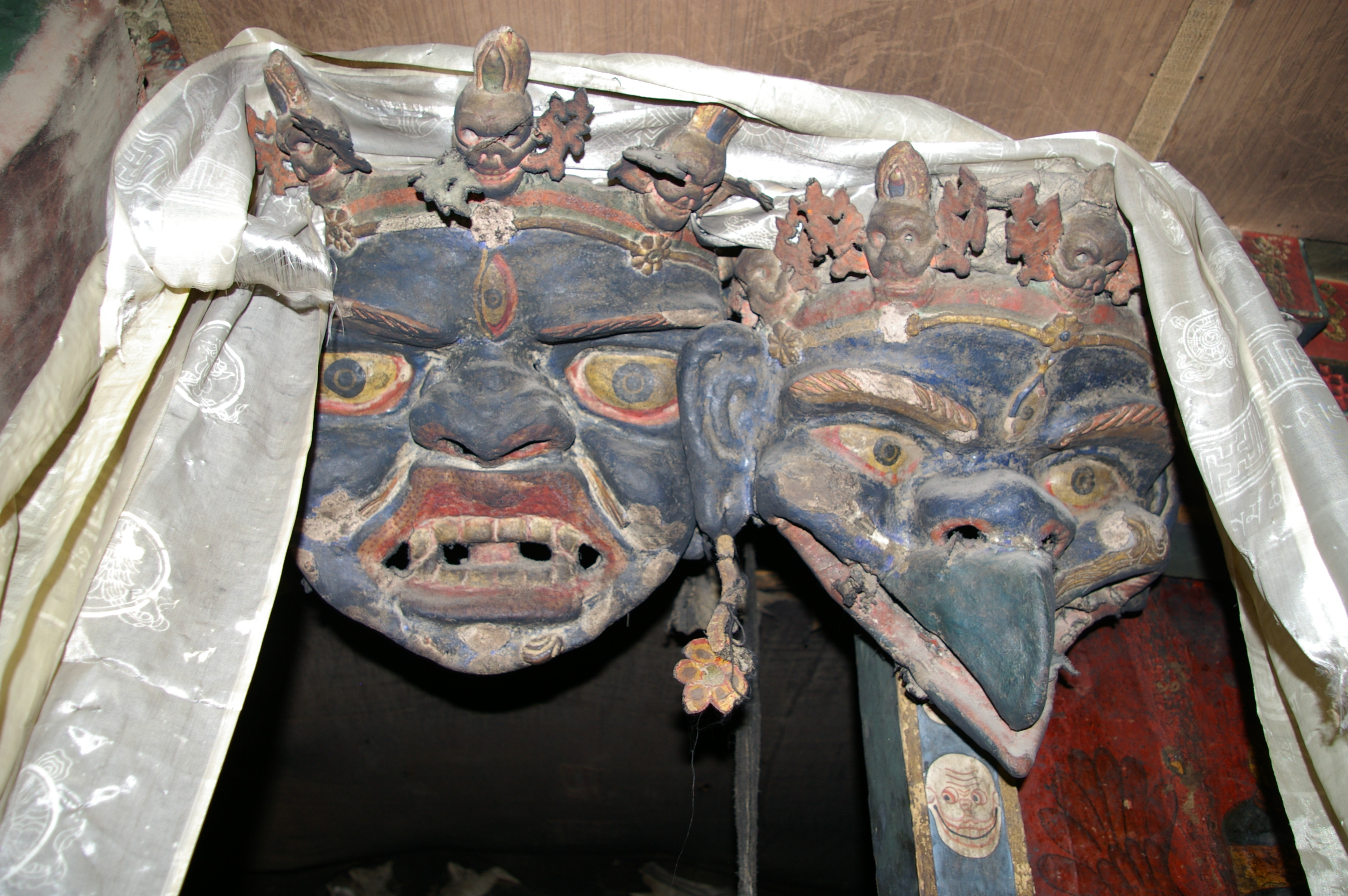 Korzok Monastery, Ladakh, India